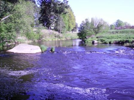 Kovashi River, Leningrad Oblast